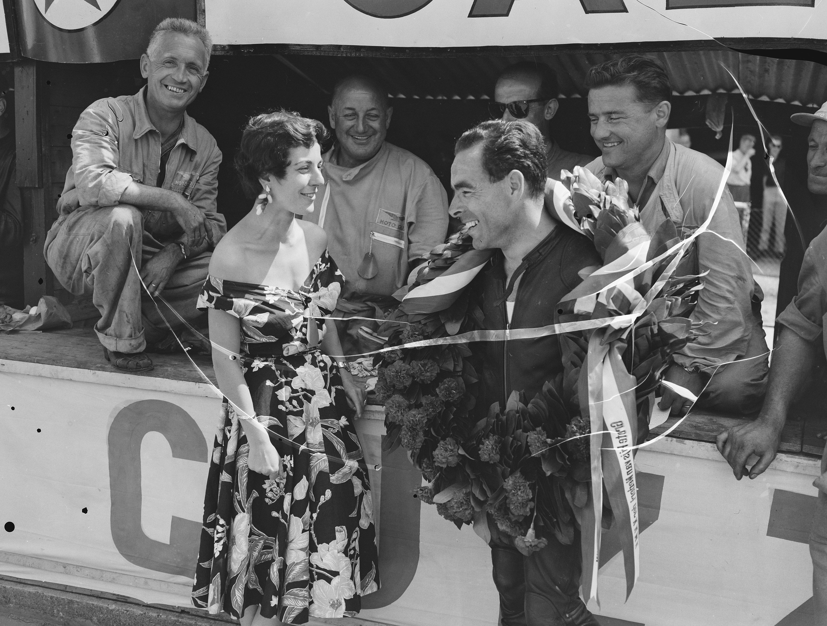 Collectie / Archief : Fotocollectie Anefo Reportage / Serie : TT Assen 1955 Beschrijving : Huldiging 350cc. Ken Kavanagh Datum : 16 juli 1955 Locatie : Assen Trefwoorden : motorsport Instellingsnaam : TT Fotograaf : Pot, Harry / Anefo Auteursrechthebbende : Nationaal Archief Materiaalsoort : Negatief (zwart/wit) Nummer archiefinventaris : bekijk toegang 2.24.01.04 Bestanddeelnummer : 907-2369